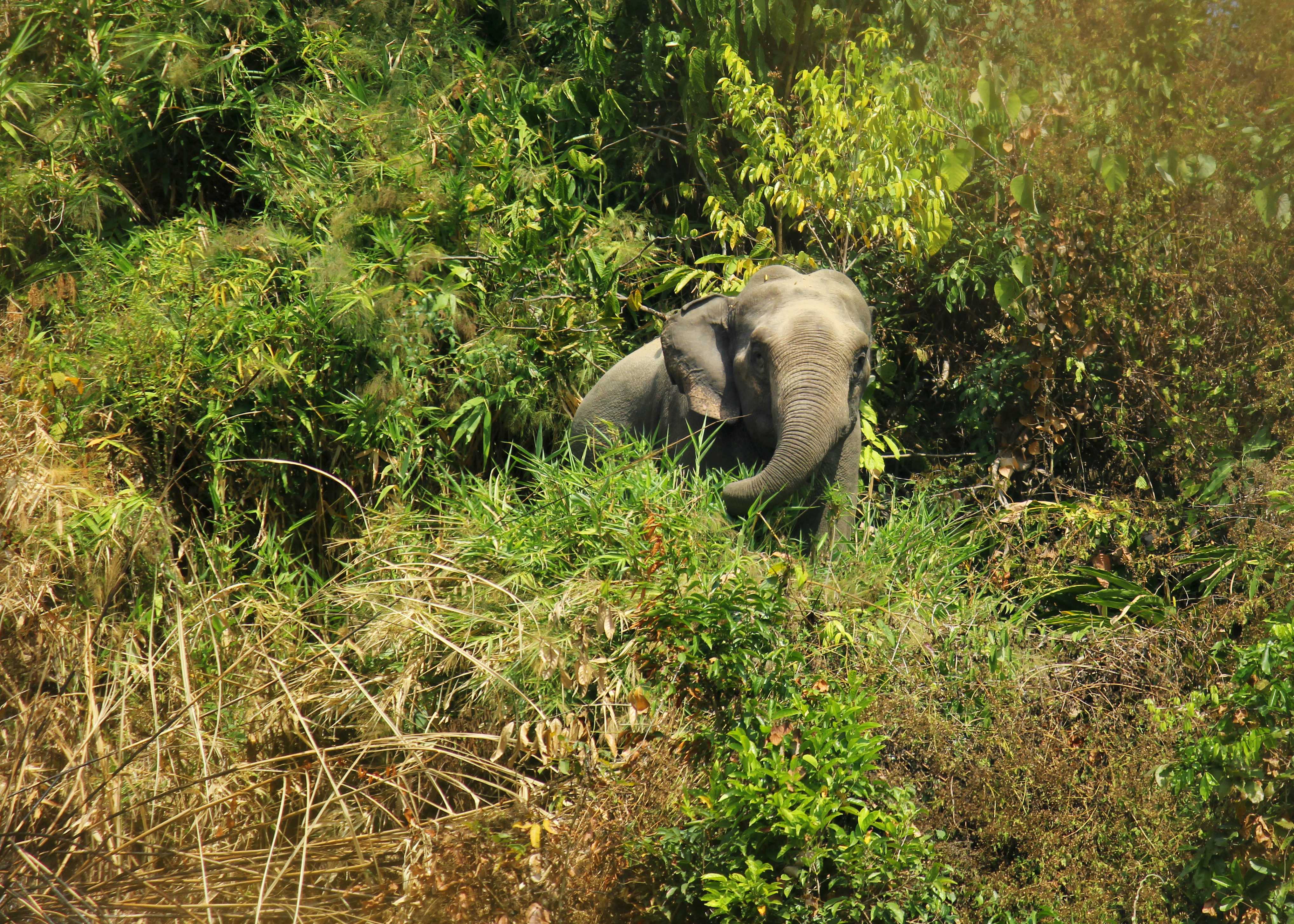 শেখ জামাল ইনানী জাতীয় উদ্যান